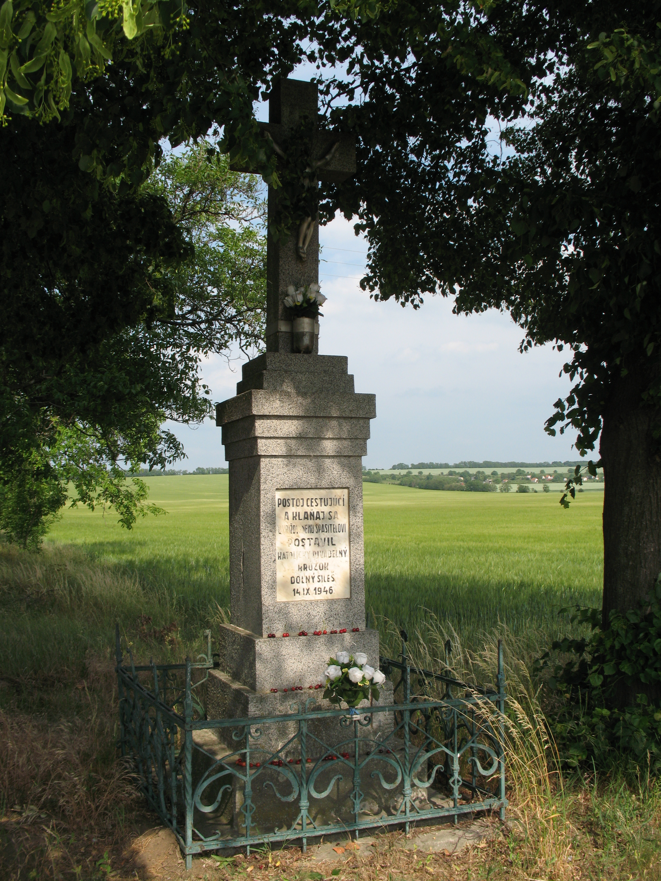 Alsószőlősi kereszt, amelyet 1946-ban emeltek